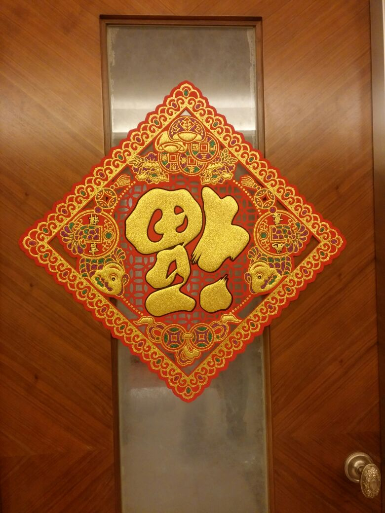 倒轉的福字揮春